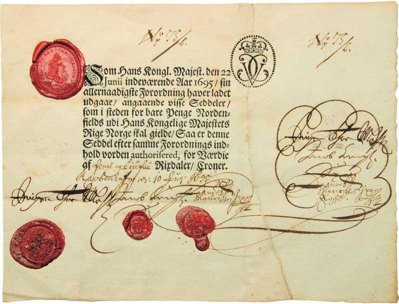 Die erste Banknote in Norwegen von 1695.